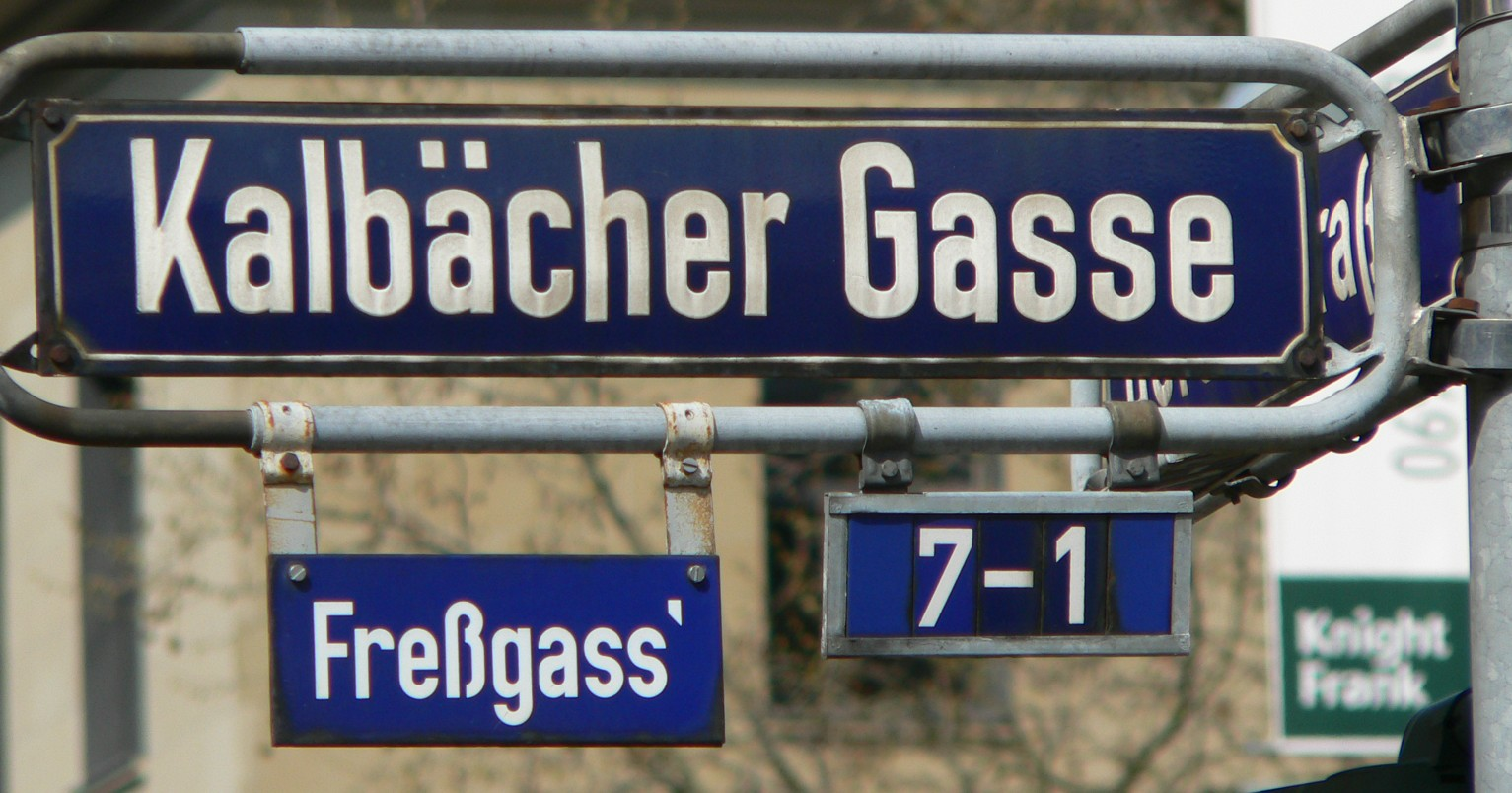 Straßenschild "Freßgass'" in Frankfurt/M